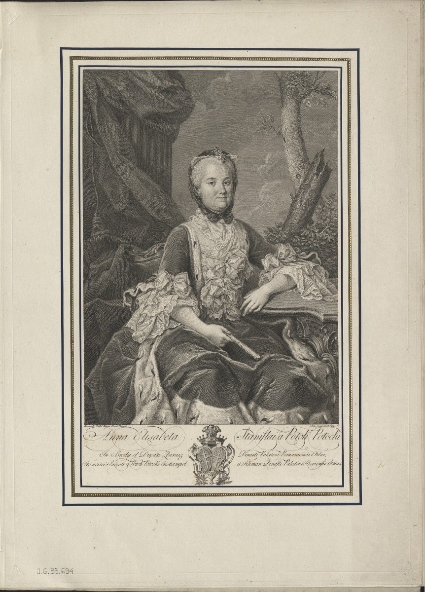 Анна Потоцька: Київська воєводина